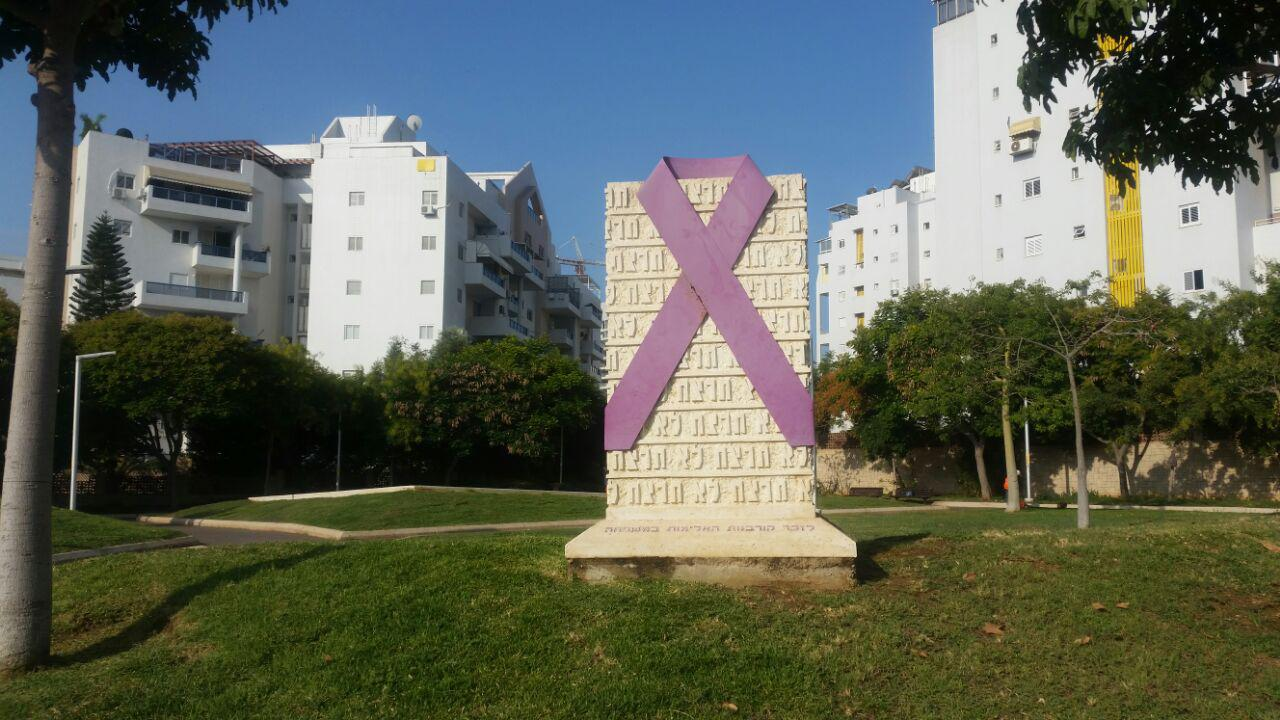 אנדרטה לזכר קורבנות האלימות במשפחה באשדוד